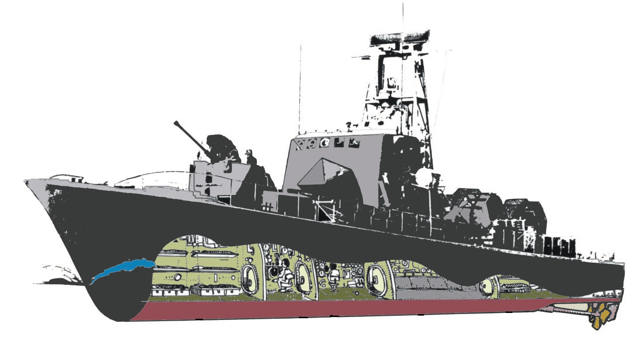 חתך ספינת טילים סער 1 ו2